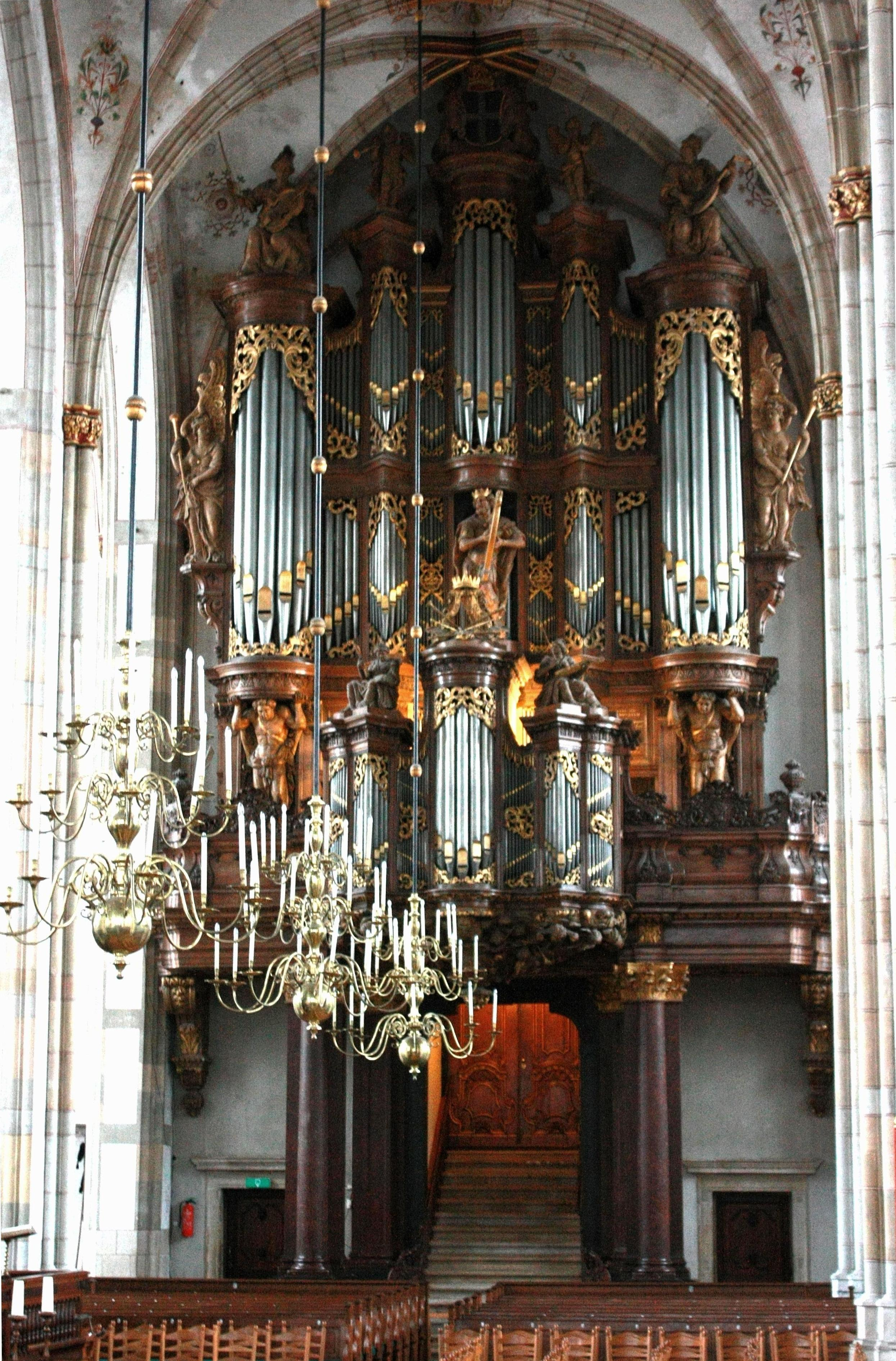 Spieltisch der Orgel in Zwolle, Sint Michaëlskerk, Niederlande